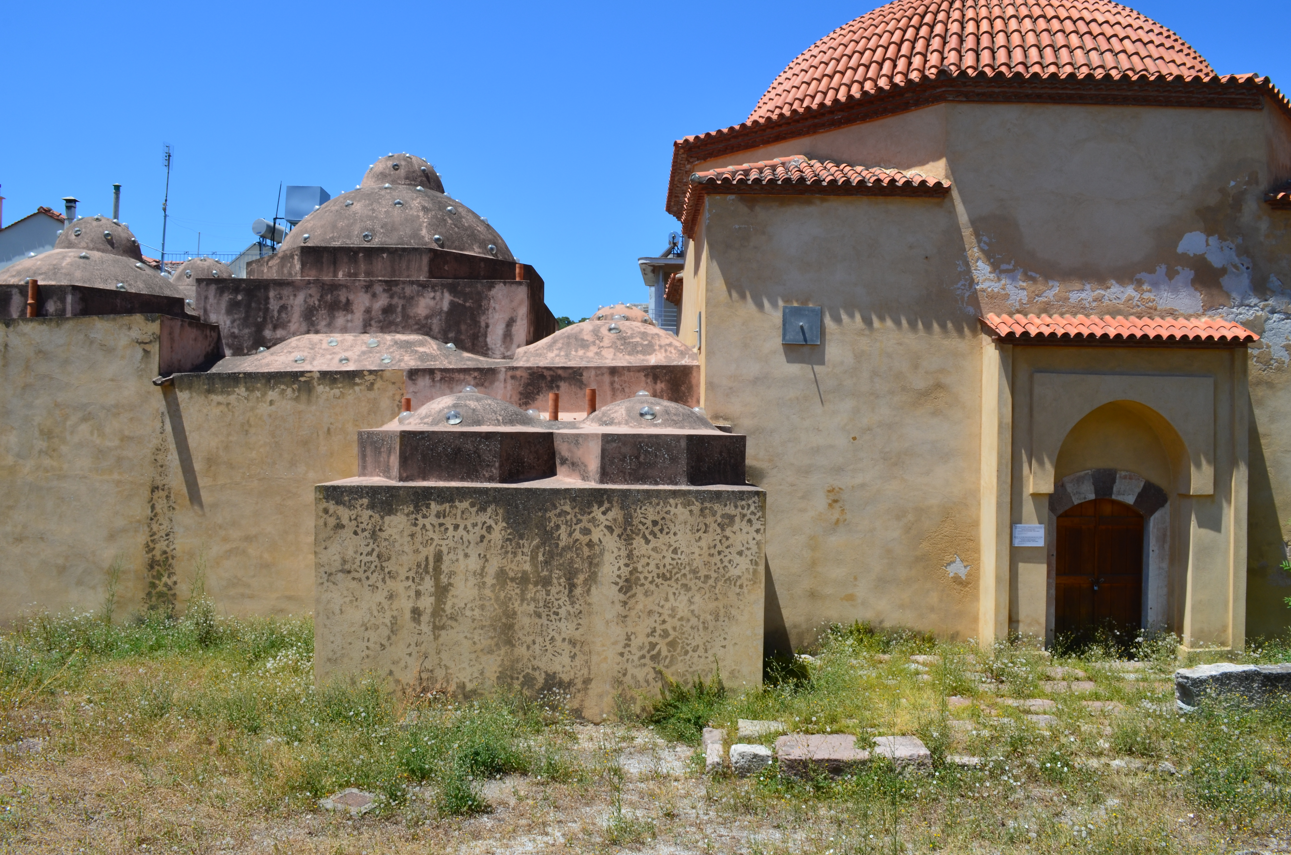 Der Tsarsi Hamam, welches von Mustafa Ağa Kulaksız erbaut zwischen 1820 und 1825 errichtet worden ist.